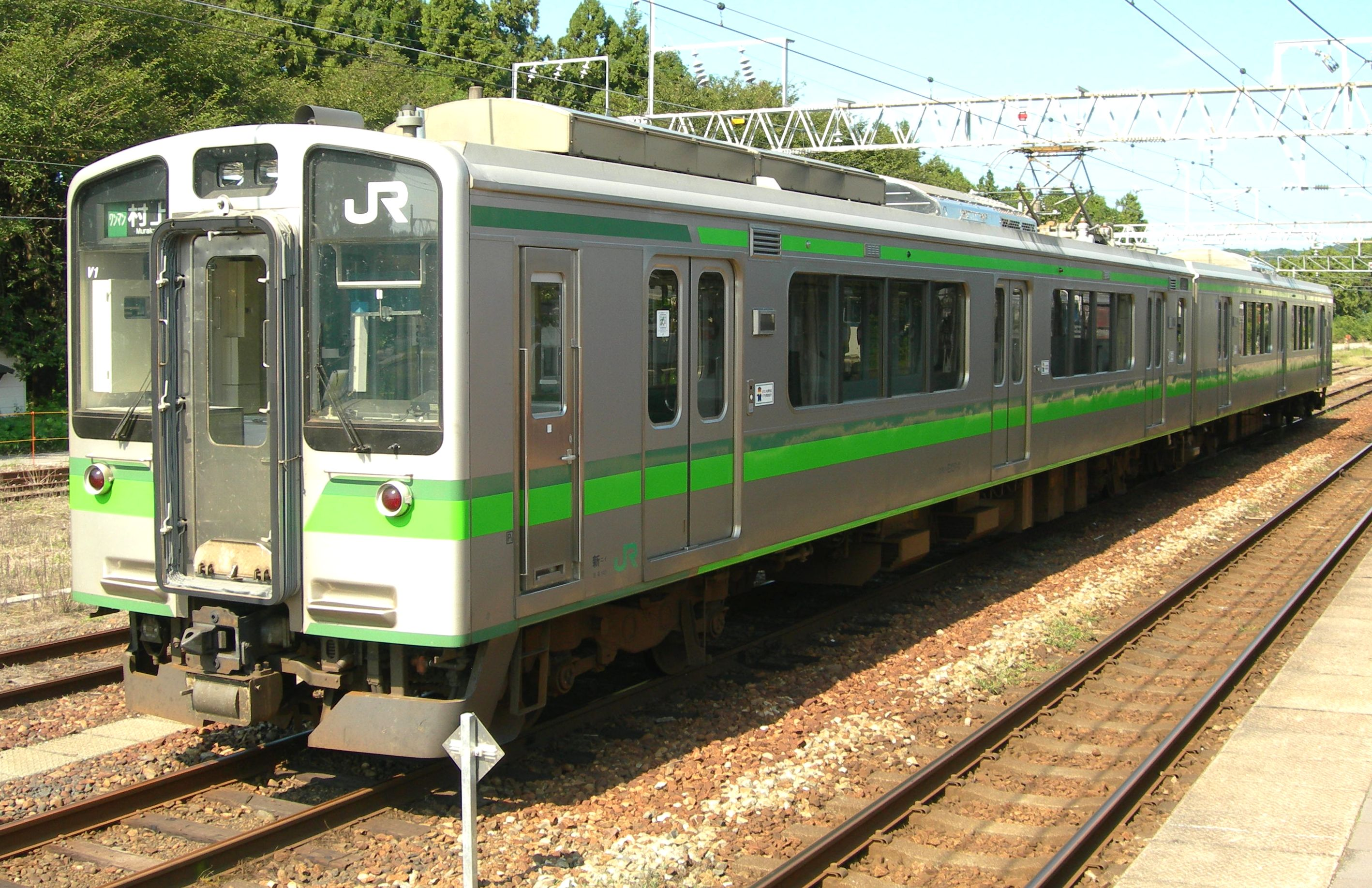 JR東日本E127系電車0番台、V1編成(村上駅にて)